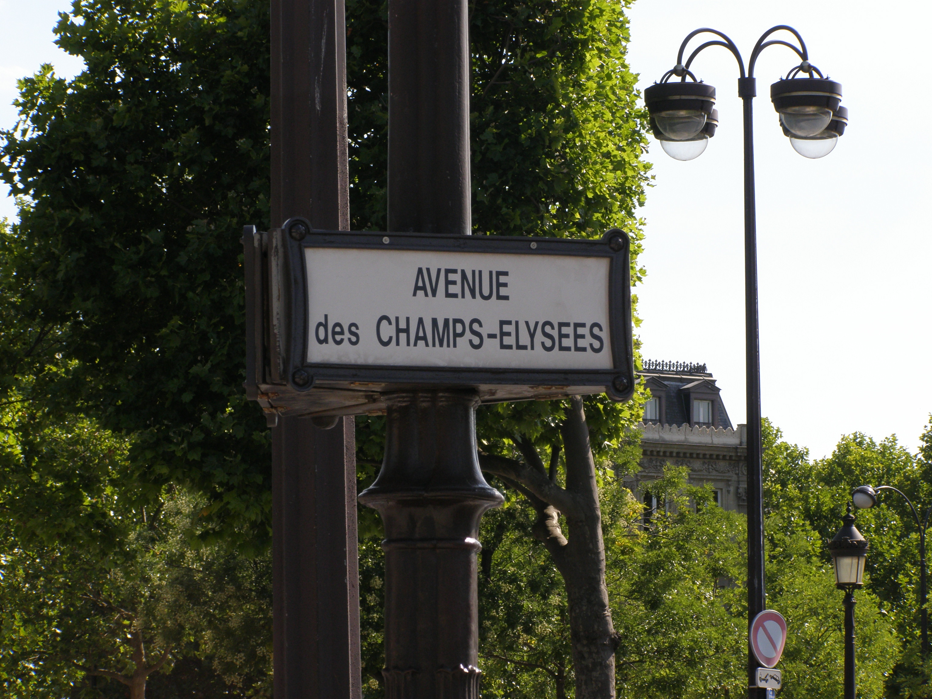 Avenue des Champs-Élysées